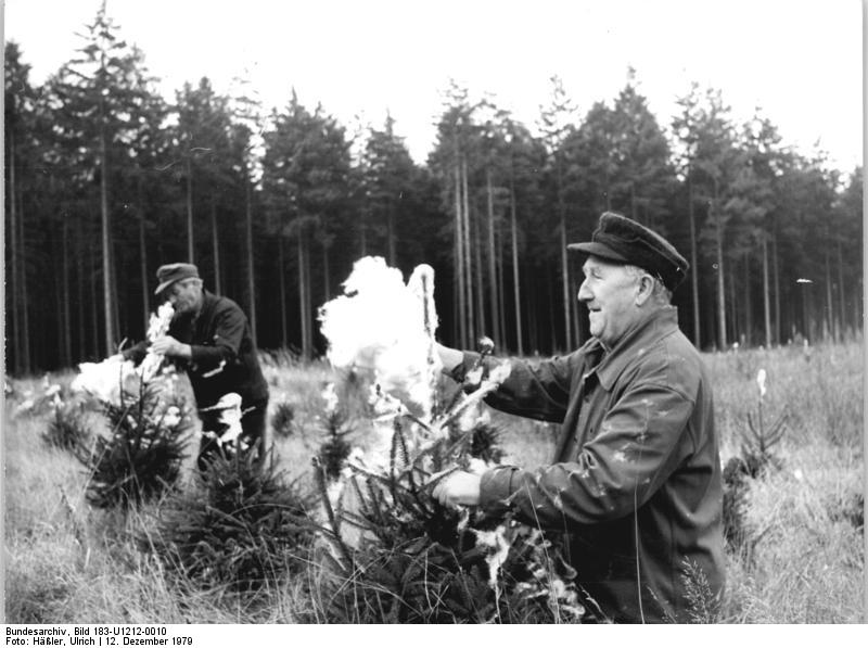 Dresden, Forstarbeiter, Schutz gegen Wildverbiss ADN-ZB Häßler 12.12.1979 Bez. Dresden: Nicht die Weihnachtsmänner sind hier im Werk sondern Forstarbeiter des Staatlichen Forstwirtschaftsberiebes Dresden. Im Revier Langebrück in der Dresdner Heide schützen sie die Triebe junger Nadelbäume mit technischer Watte vor Wildverbiss. Franz Nadler und Willi Kruschinske (l.) präparierten auf diese Art bereits 20 ha Schonung.